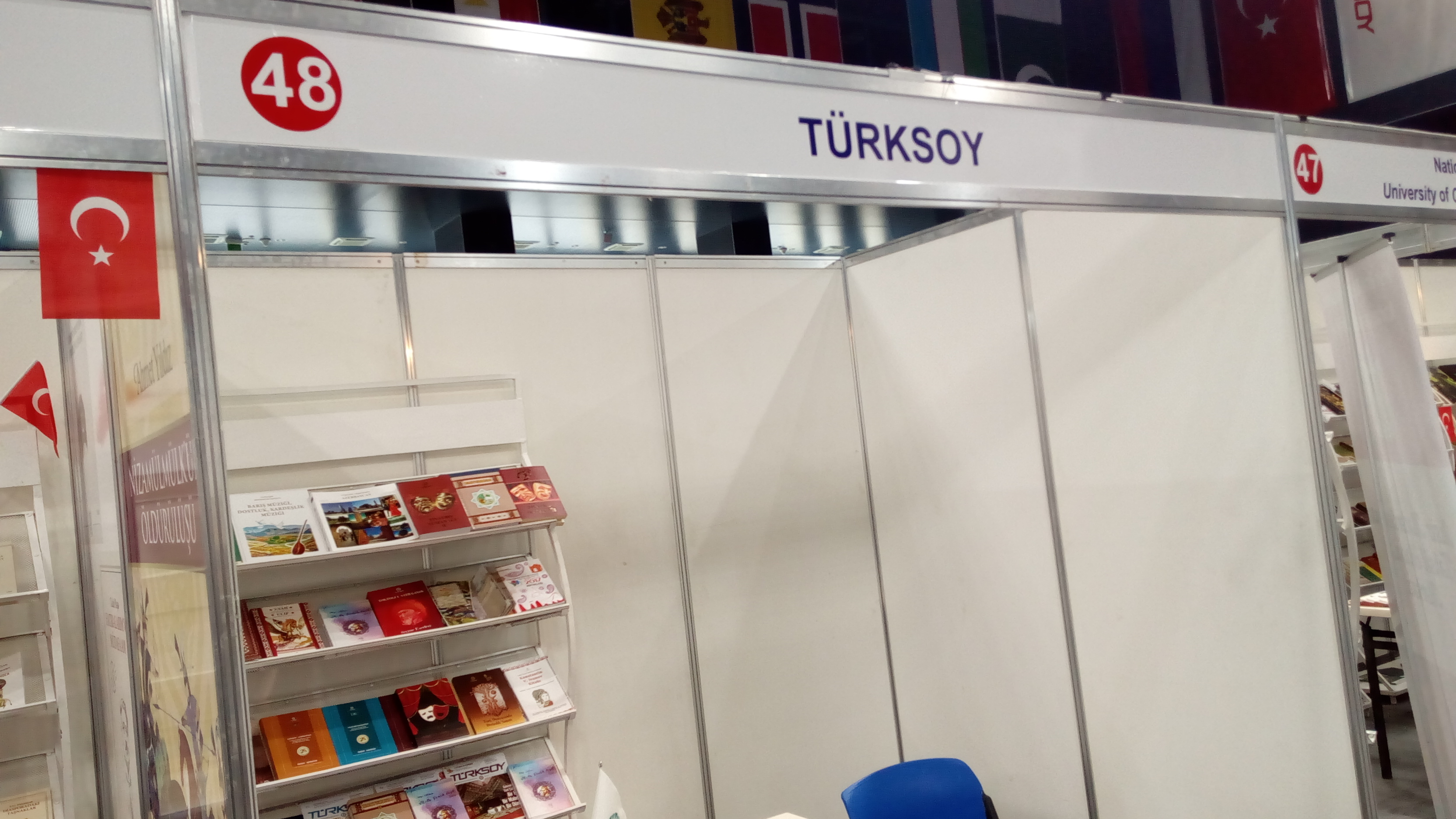 V Bakı Beynəlxalq Kitab Sərgi-Yarmarkası